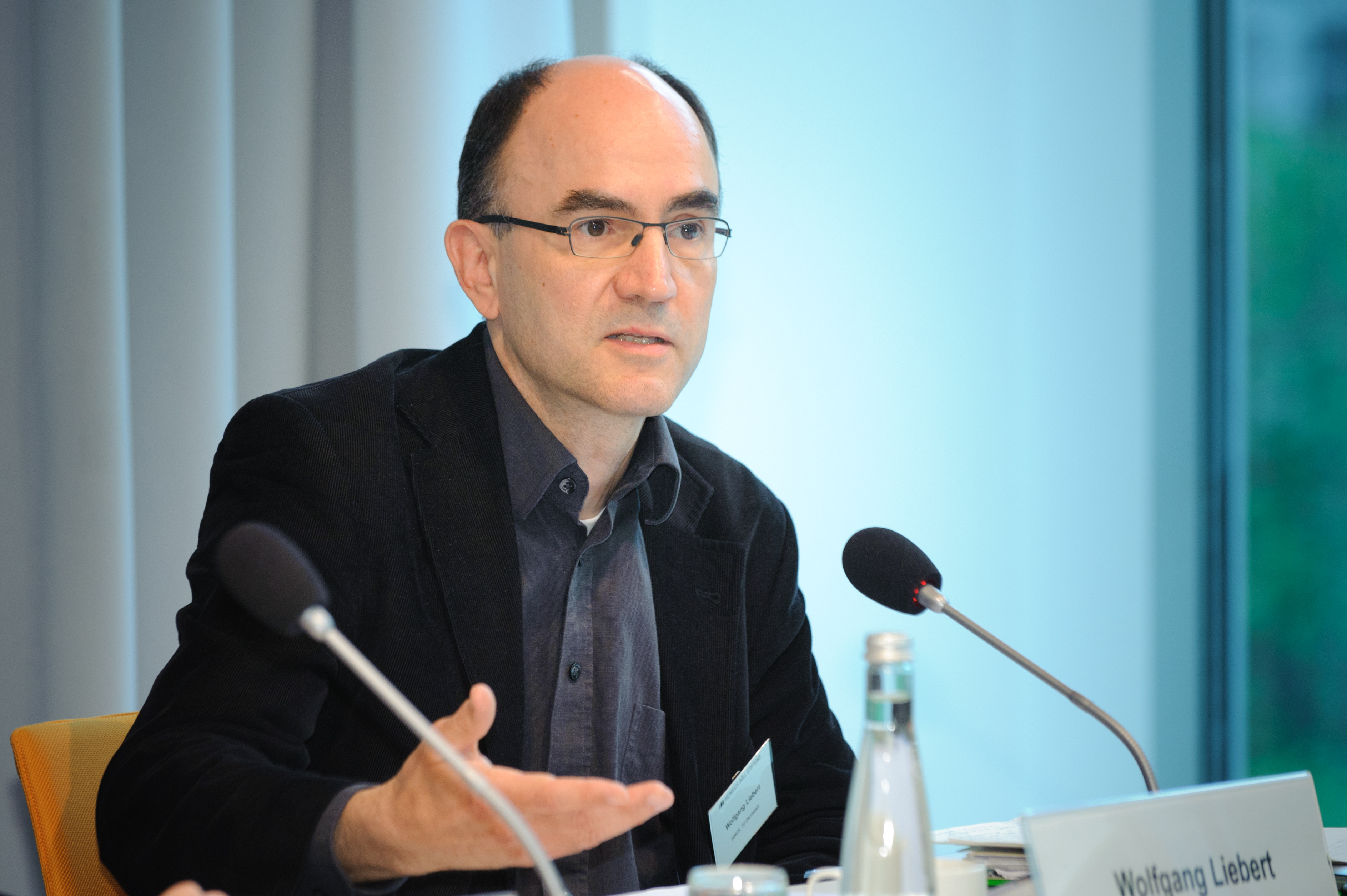 Wolfgang Liebert (TU Darmstadt) Foto: Stephan Röhl